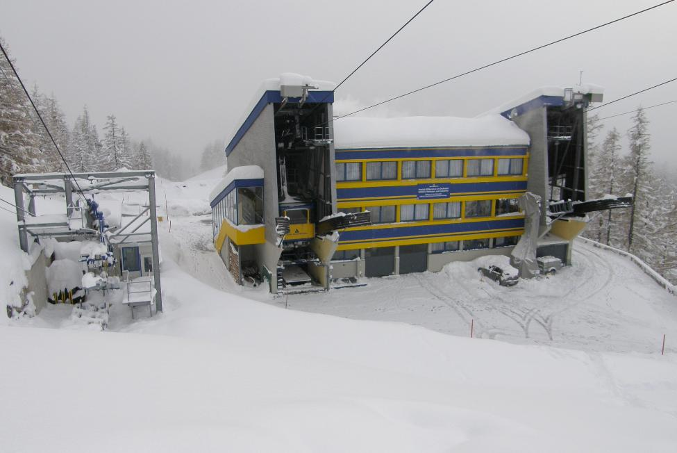 Dachstein, Talstation, stacja dolna